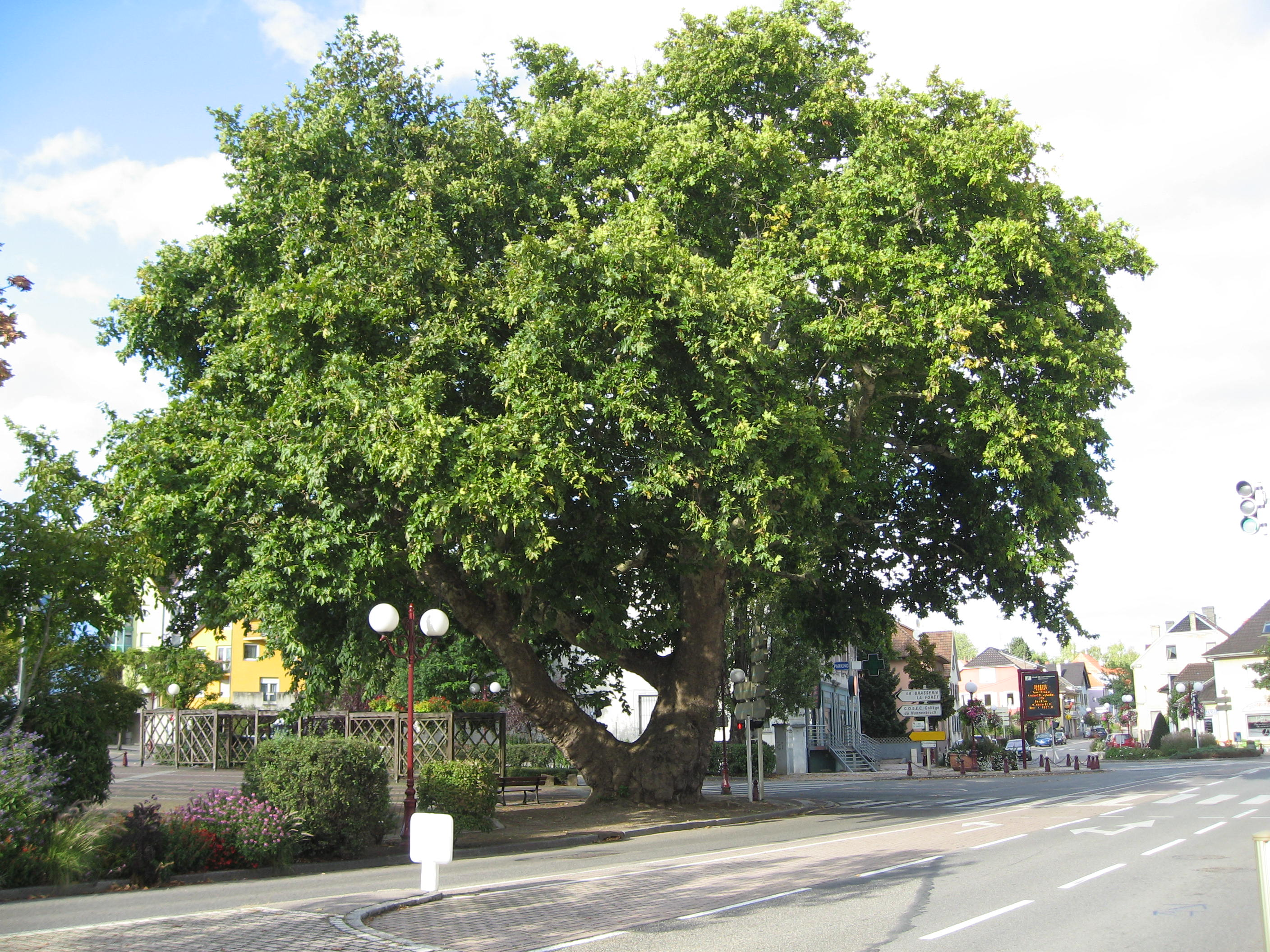 arbre bicentenaire remarquable